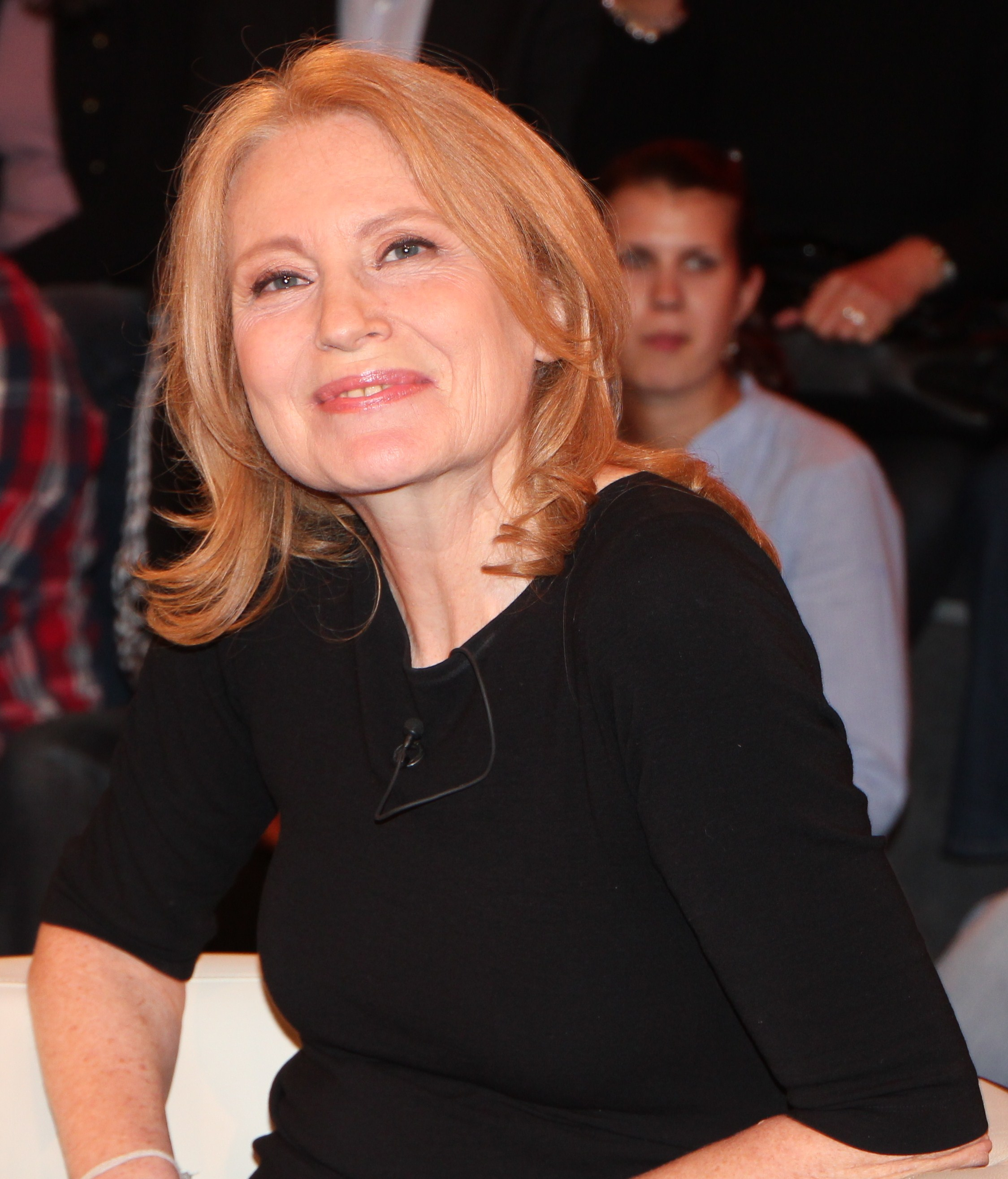 Maren Kroymann (* 19. Juli 1949 in Walsrode) ist eine deutsche Schauspielerin, Kabarettistin und Sängerin.